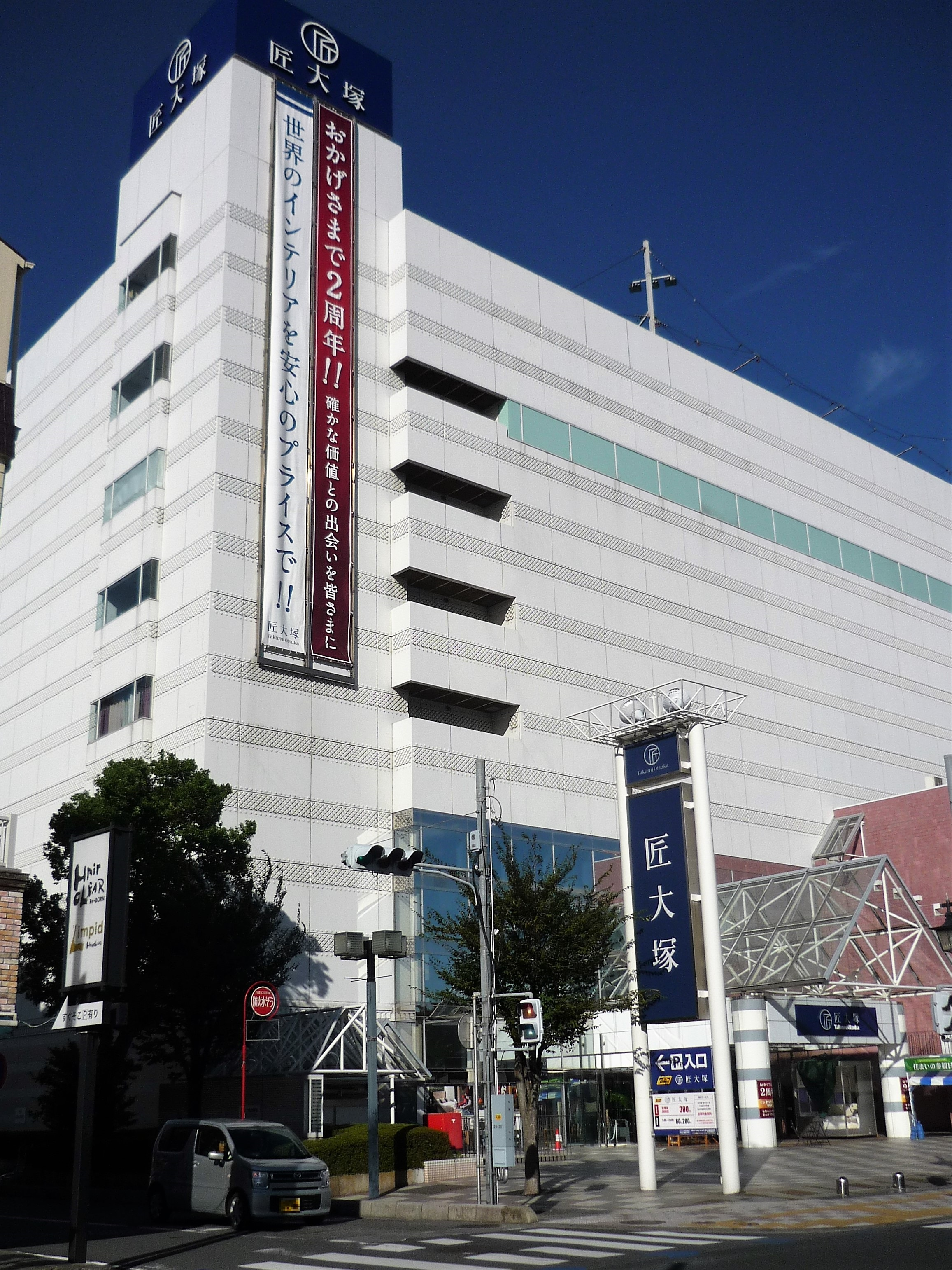 匠大塚 春日部本店（旧・ロビンソン百貨店→西武百貨店）